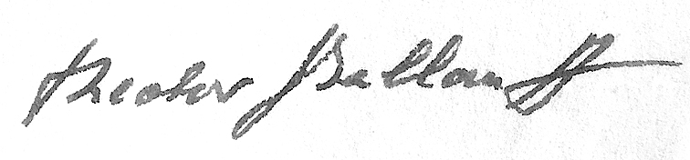 Theodor Ballauff, Pädagoge. Signatur vom 15.12.1972. Aus der Widmung an mich zum Abschluß seines dreibändigen Werkes »PÄDAGOGIK. Geschichte der Bildung und Erziehung«.